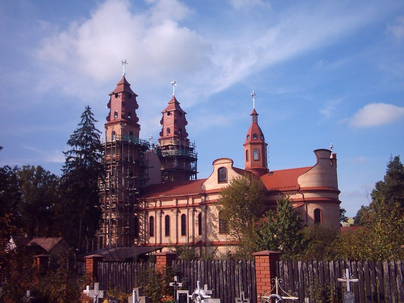 Kościół Św. Cyryla i Metodego w Hajnówce